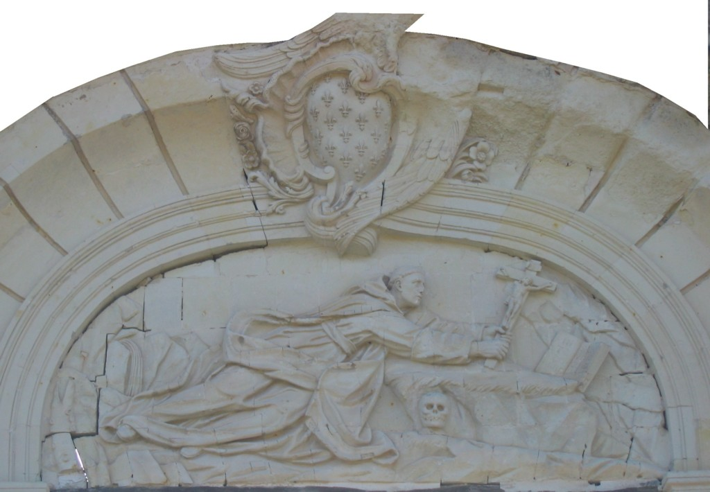 Tympan sud du Liget représentant Saint Bruno en prière.